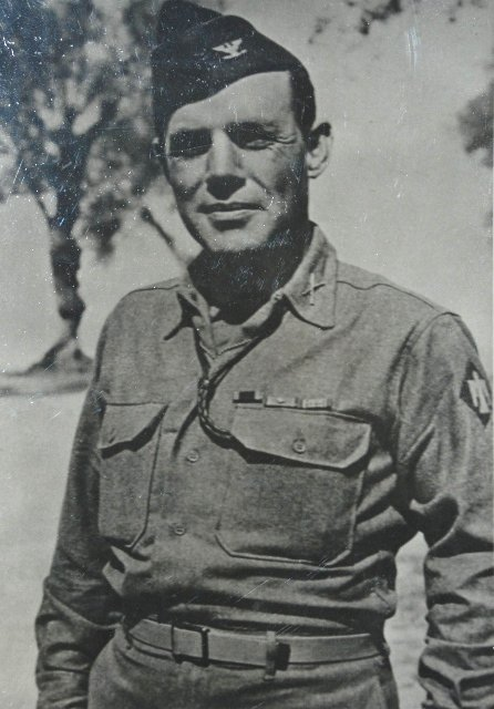 William Orlando Darby